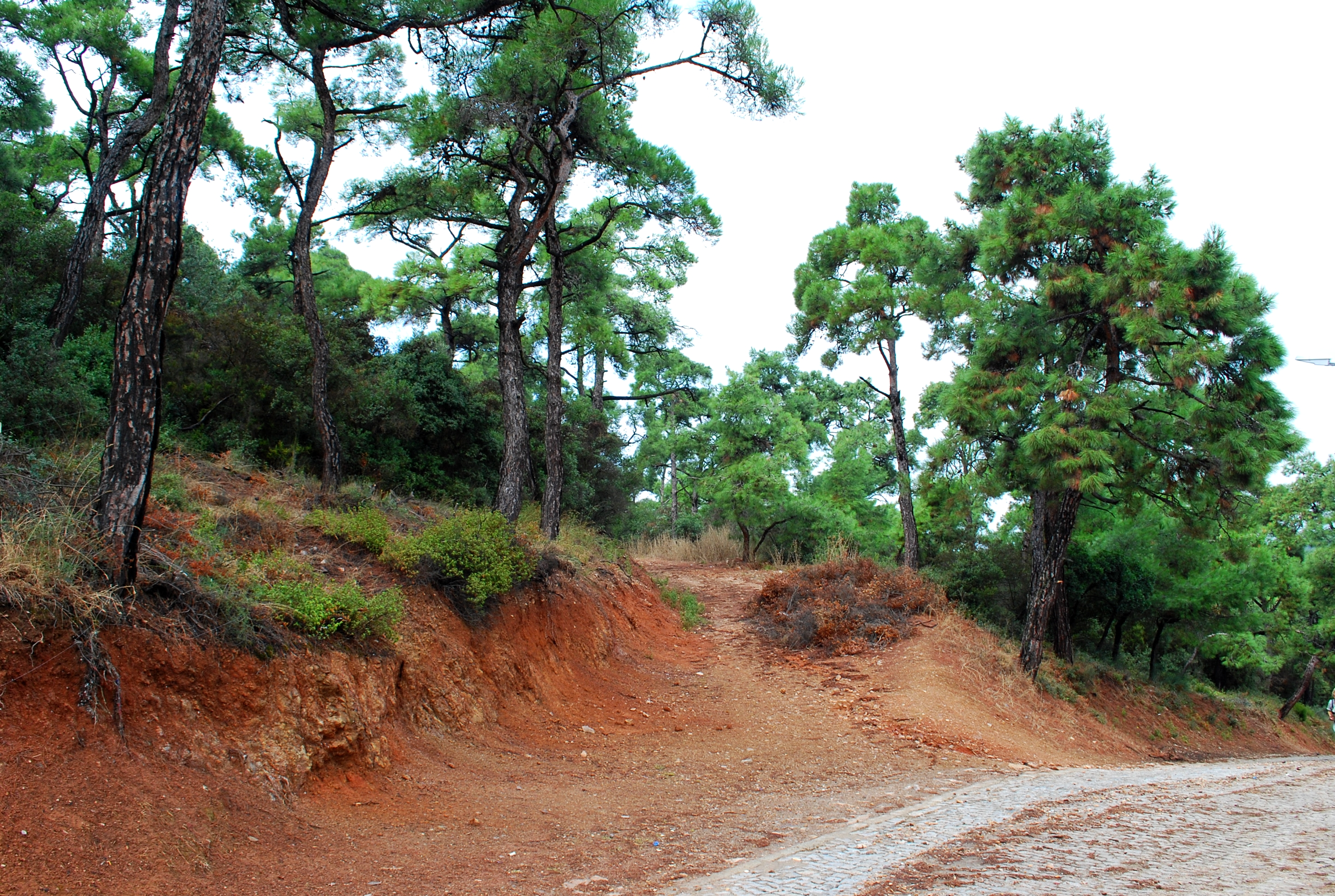 Красная земля